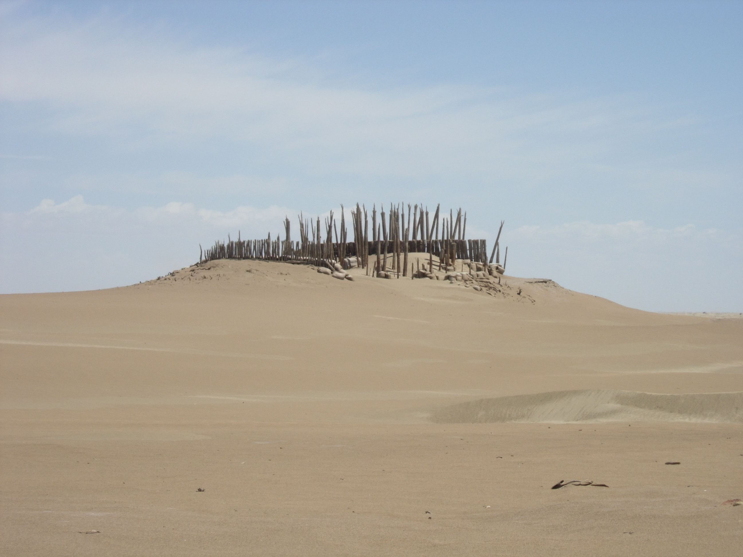 小河墓地。Creek burial, Urumqi, Xinjiang